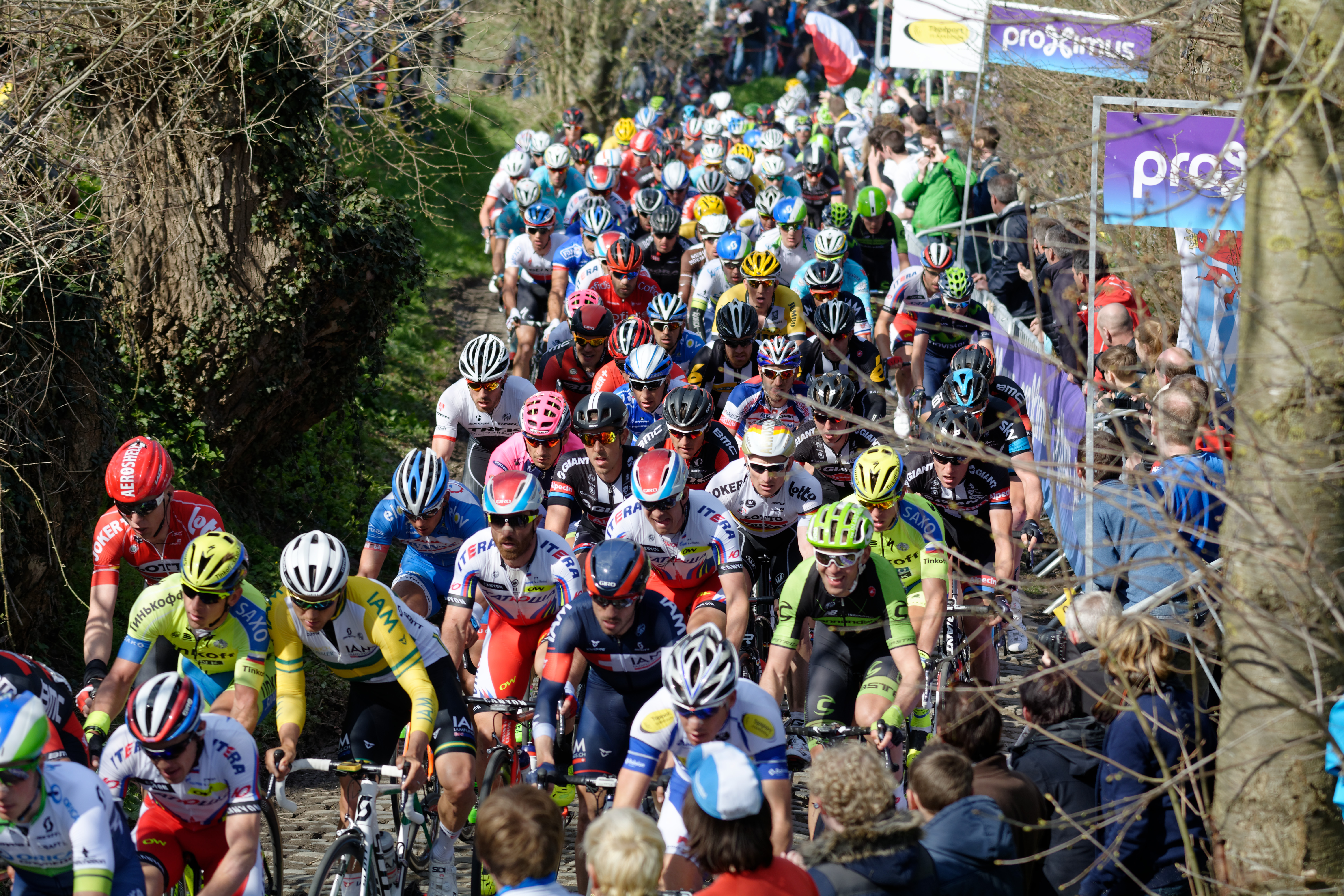 D71_6615_DxO